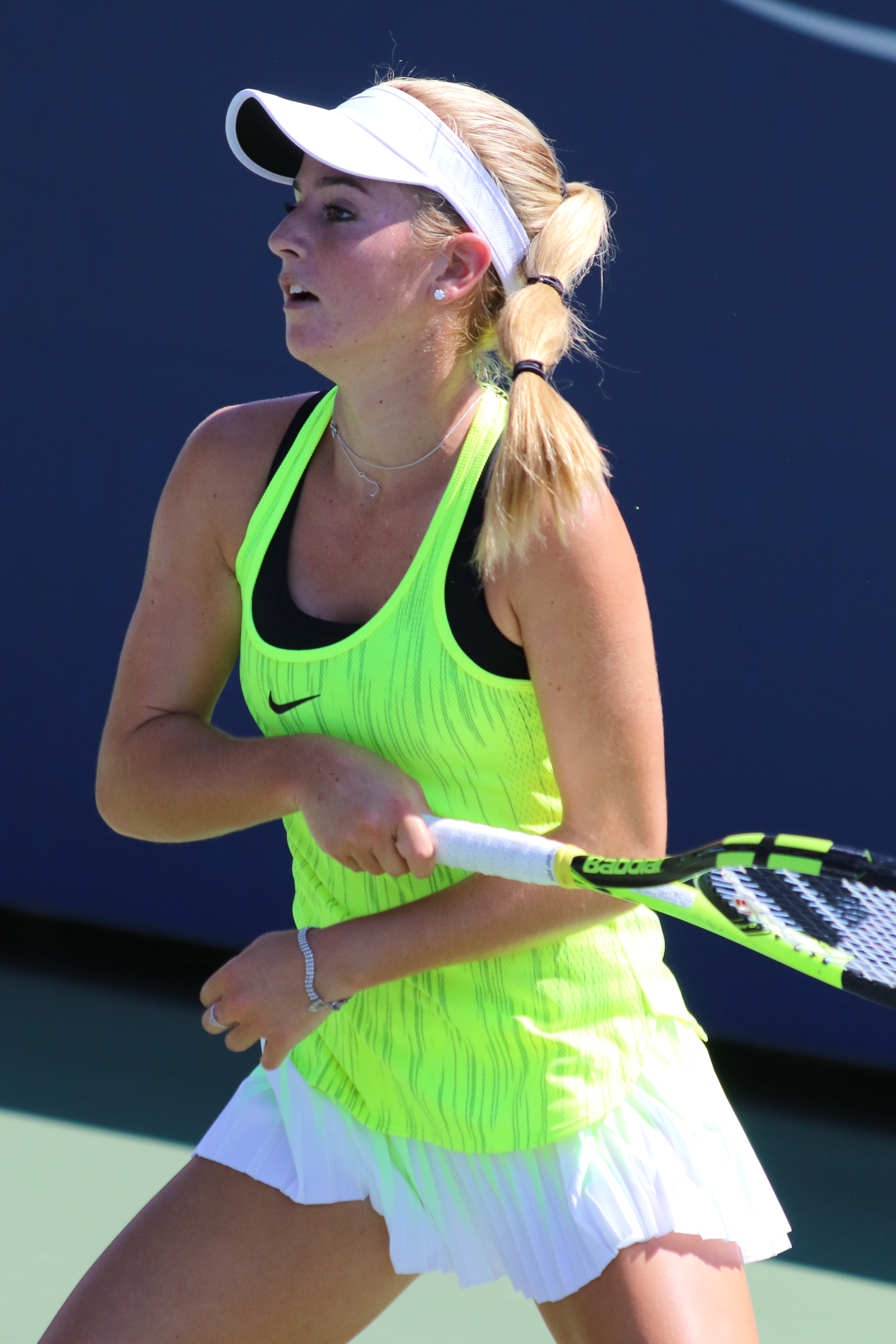 Bellis US16 (14)